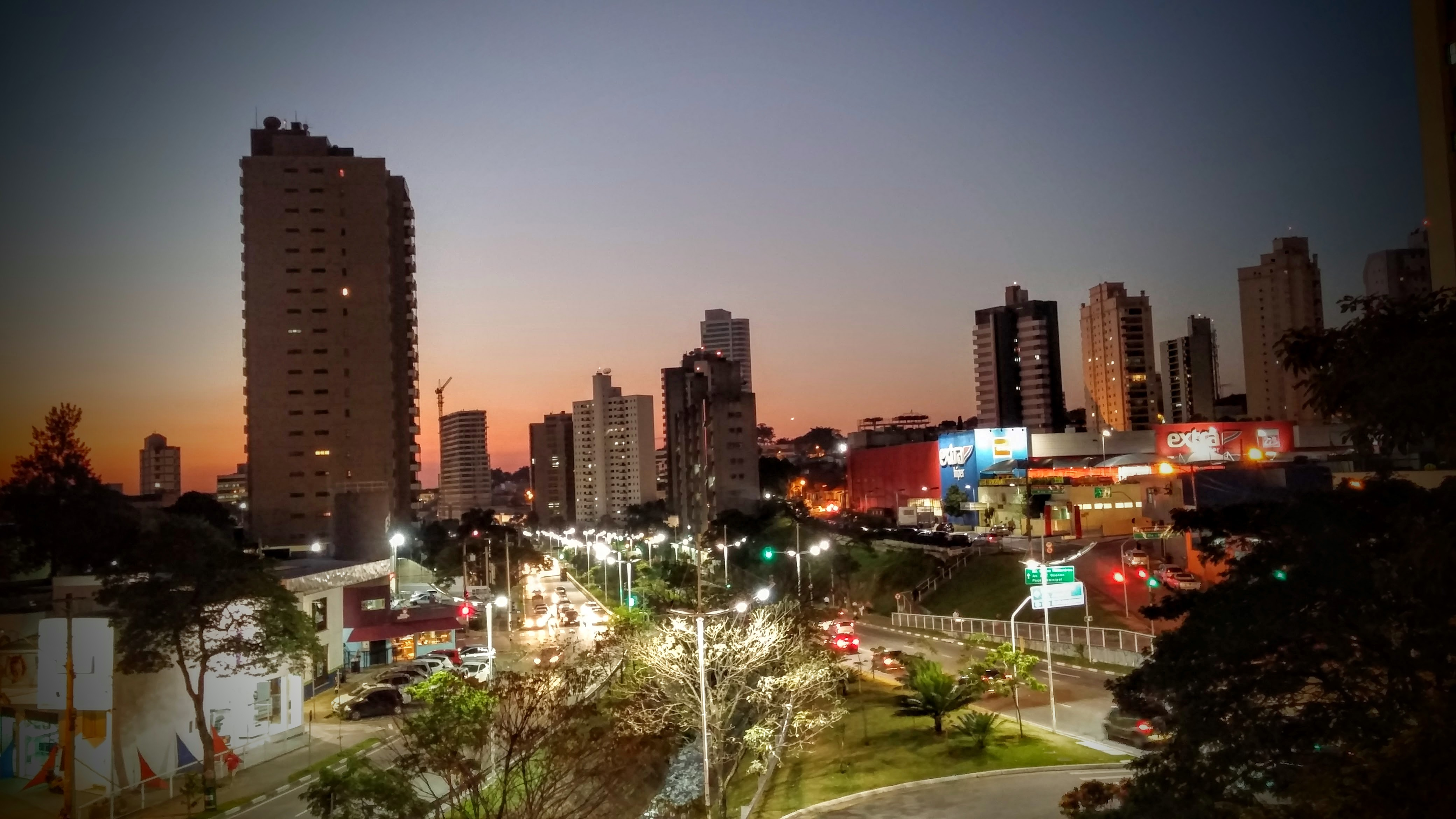 Centro, Jundiaí - SP, Brazil